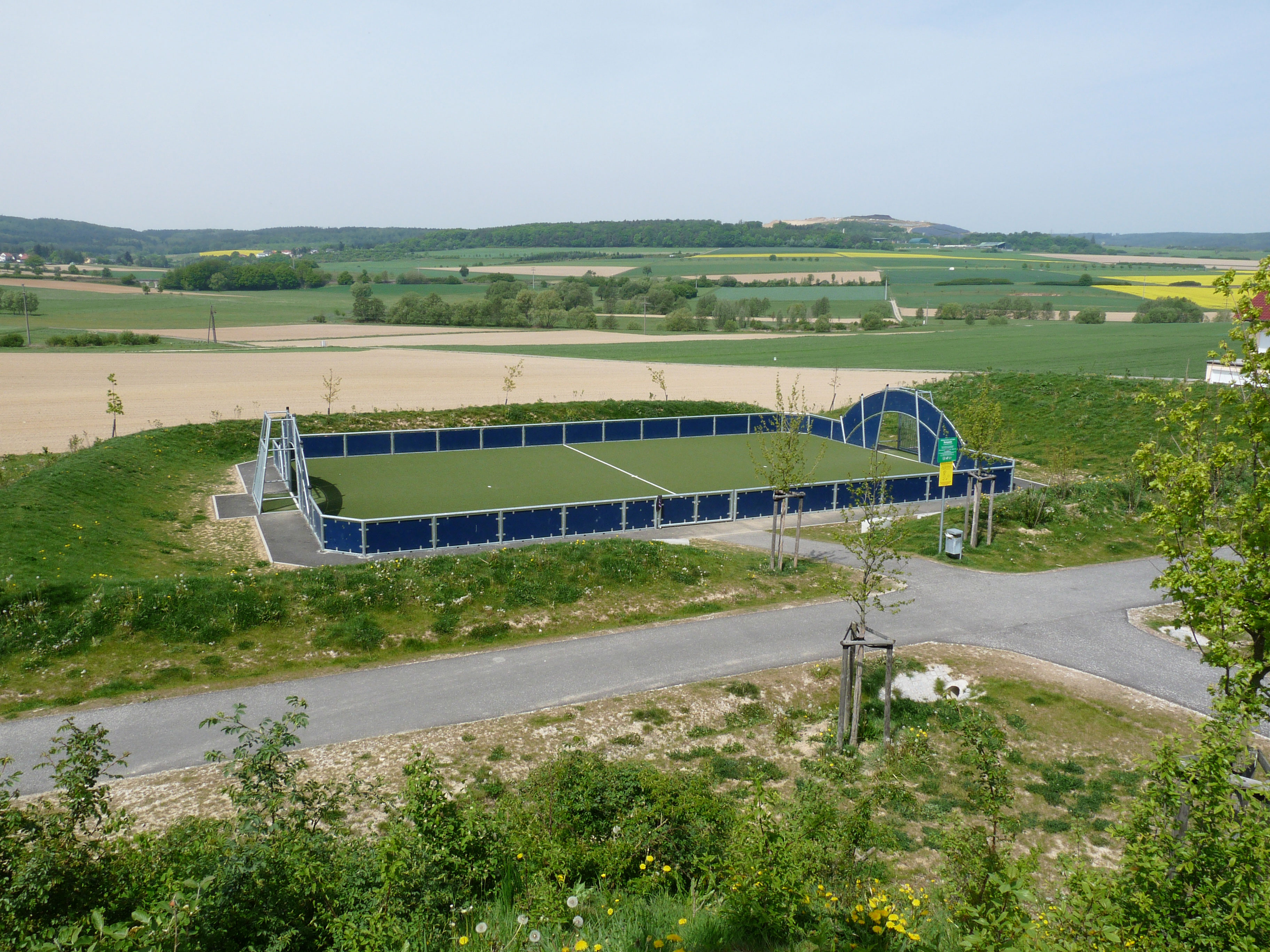 Bolzplatz in Neu-Anspach